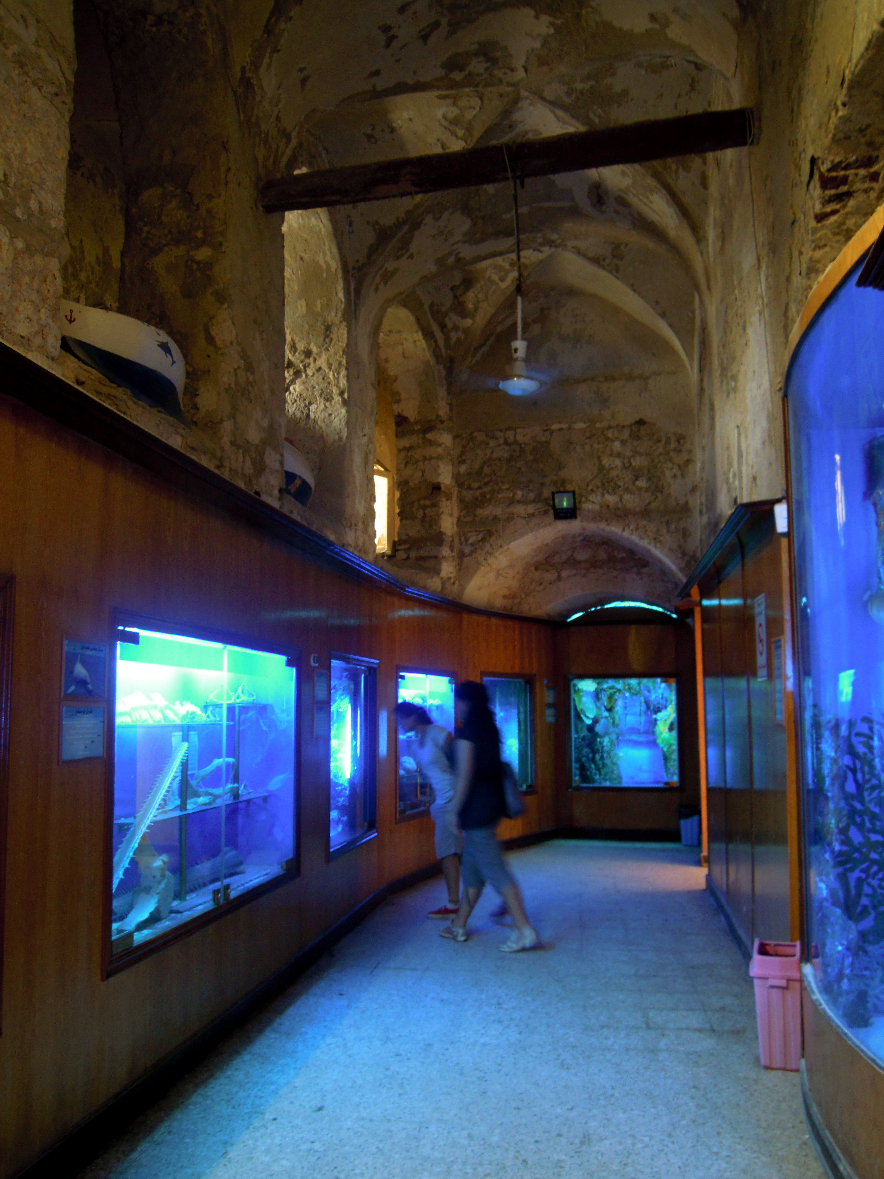 Aquarium Museum, Alexandria